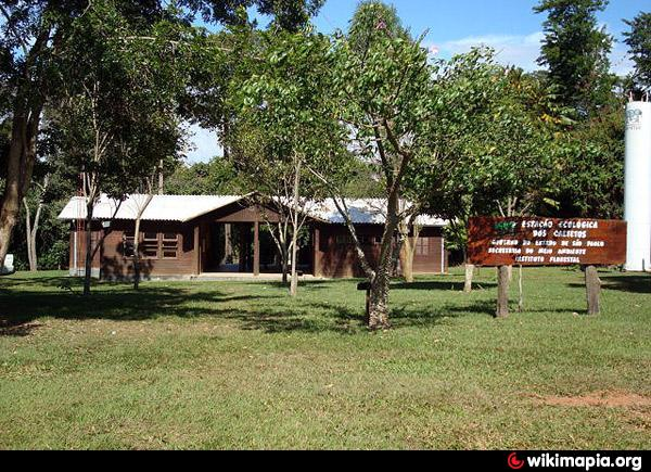 Foto da Estação Ecológica Caetetus